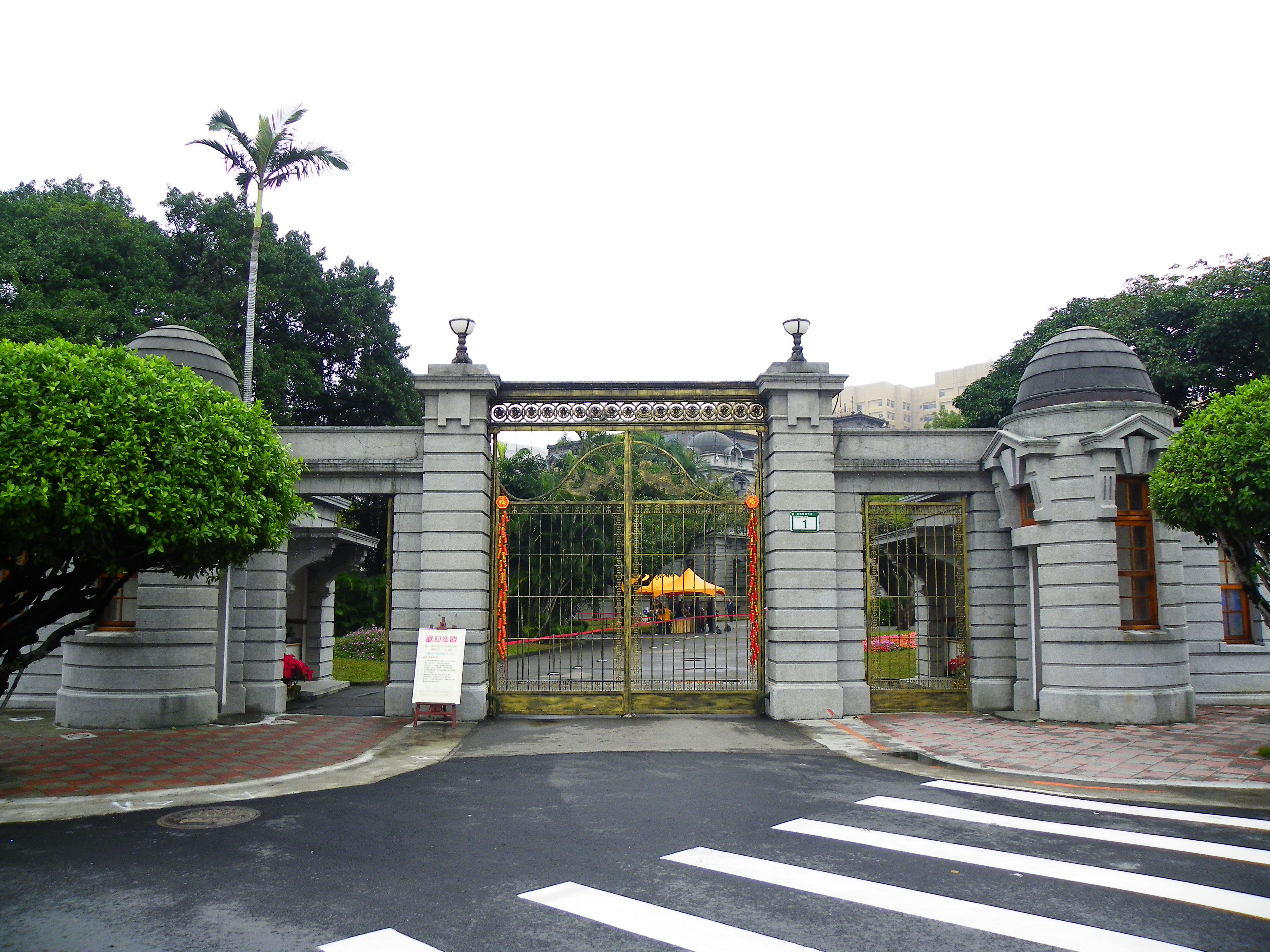 台北賓館の正門前。